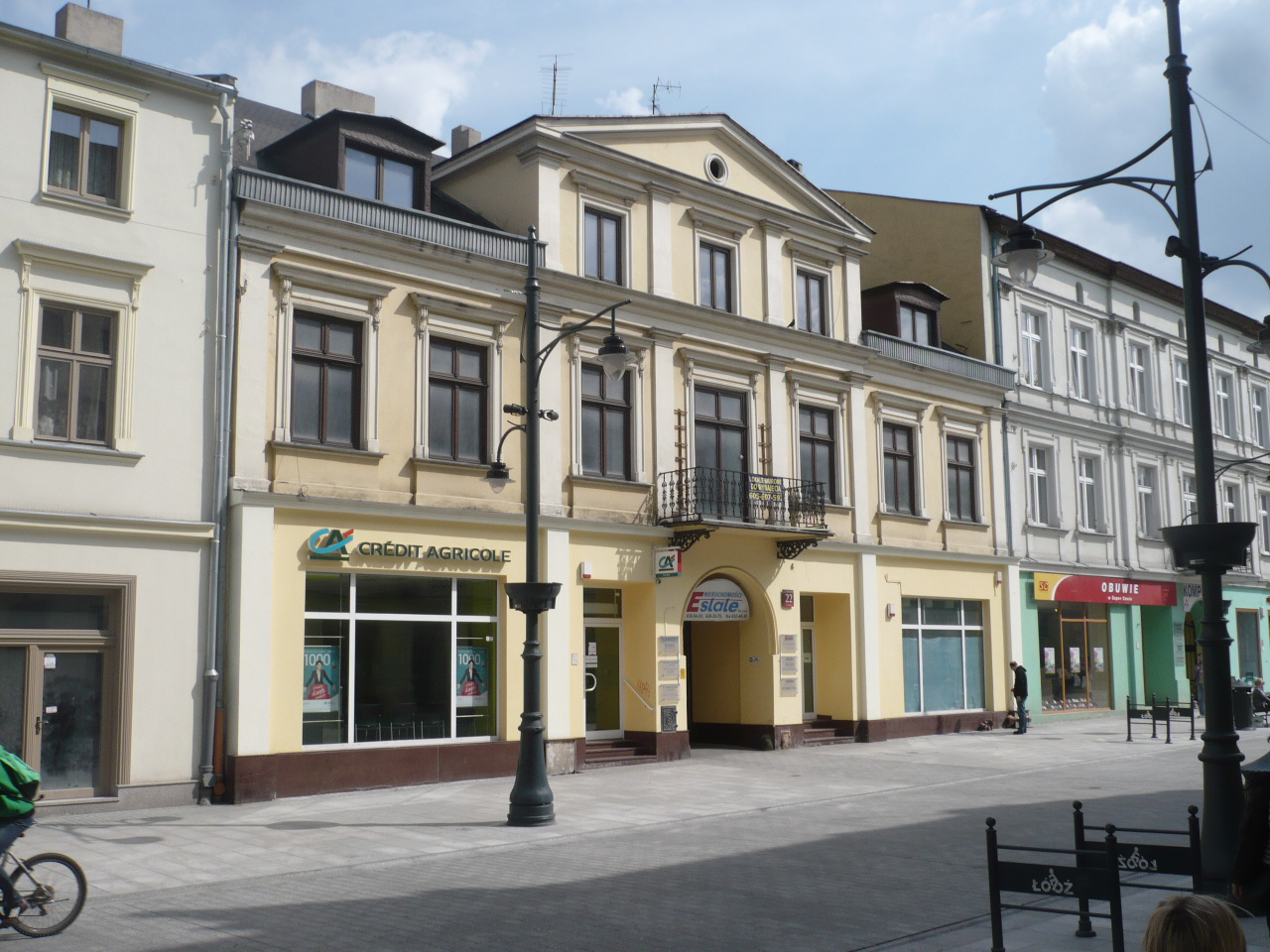 Lodz, ul. Piotrkowska 22; przed I wojną światową nr 25. Tu mieściła się m.in. Apteka Maurycego Spokornego.